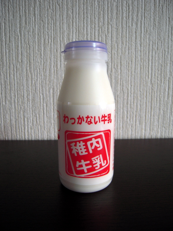 稚内牛乳の写真